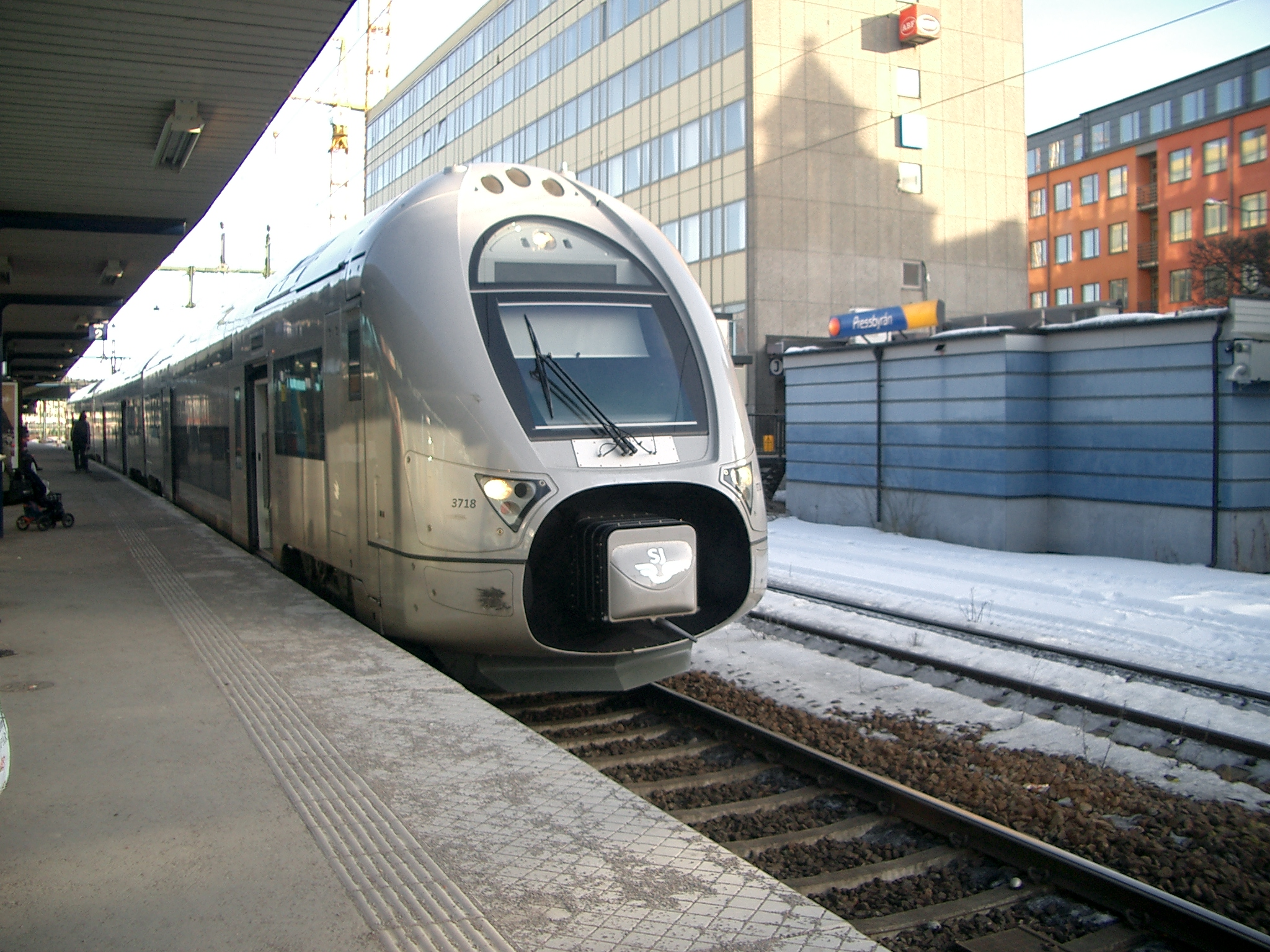 SJ Regional Double Decker - Class X40